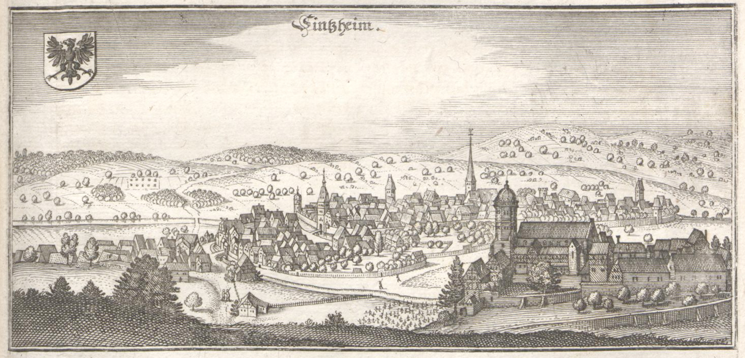 Matthäus Merian Topographia Palatinatus Rheni et Vicinarum Regionum Das ist, Beschreibung vnd Eigentliche Abbildung der Vornemsten Statte, Plätz der Vntern Pfaltz am Rhein Vnd Benachbarten Landschafften, als der Bistümer Wormbs Vnd Speÿer, der Bergstraß, des Wessterreichs, Hundrücks, Zweÿbrüggen, etc: Sampt einer Zugabe Ettlicher des H. Röm. Reichs Zu dem Ober Reinischen Cräyß gezogenen Ständen, alß Bisantz, Dietz, Tull, Verdun, Lothringen, Savoyen, etc: An Tag gegeben Vnd Verlegt durch Mattheum Merian. 1645. Topographia Germaniae Band 5 Quelle: Digitalisat der UB Düsseldorf